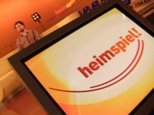 Studio der Sportsendung "Heimspiel" im Fernsehprogramm des Hessischen Rundfunks. Selbst fotografiert, daher gemeinfrei.